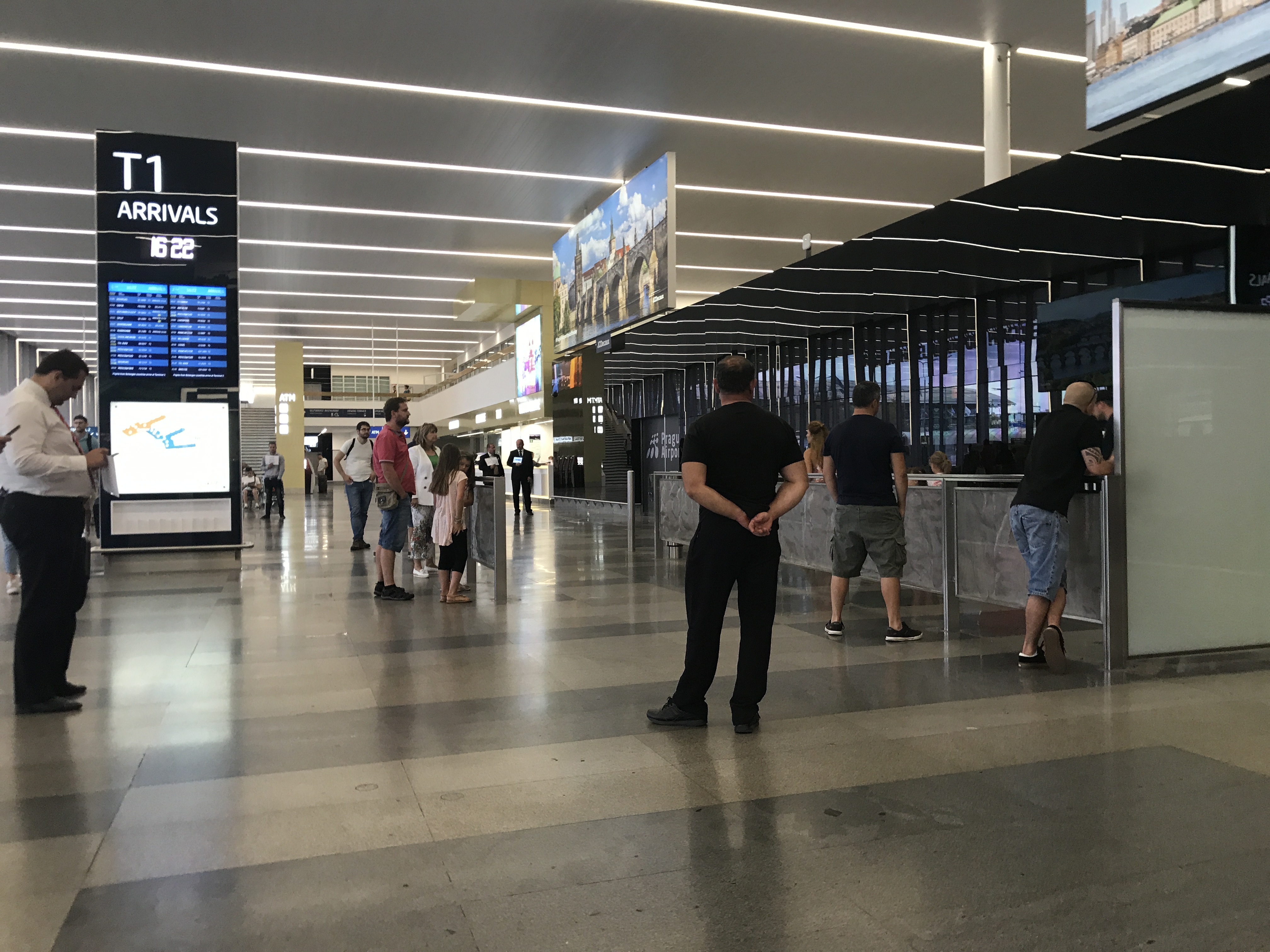 Interiér, terminál 1, letiště Václava Havla Praha